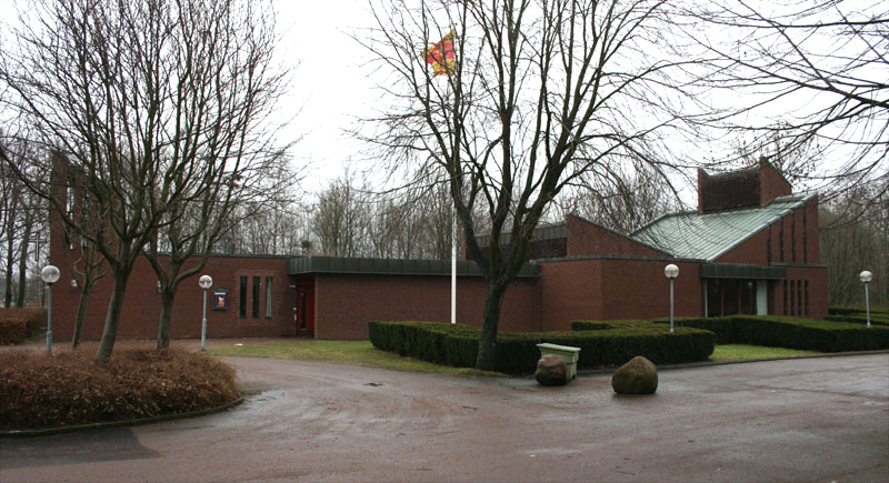 Thohoo